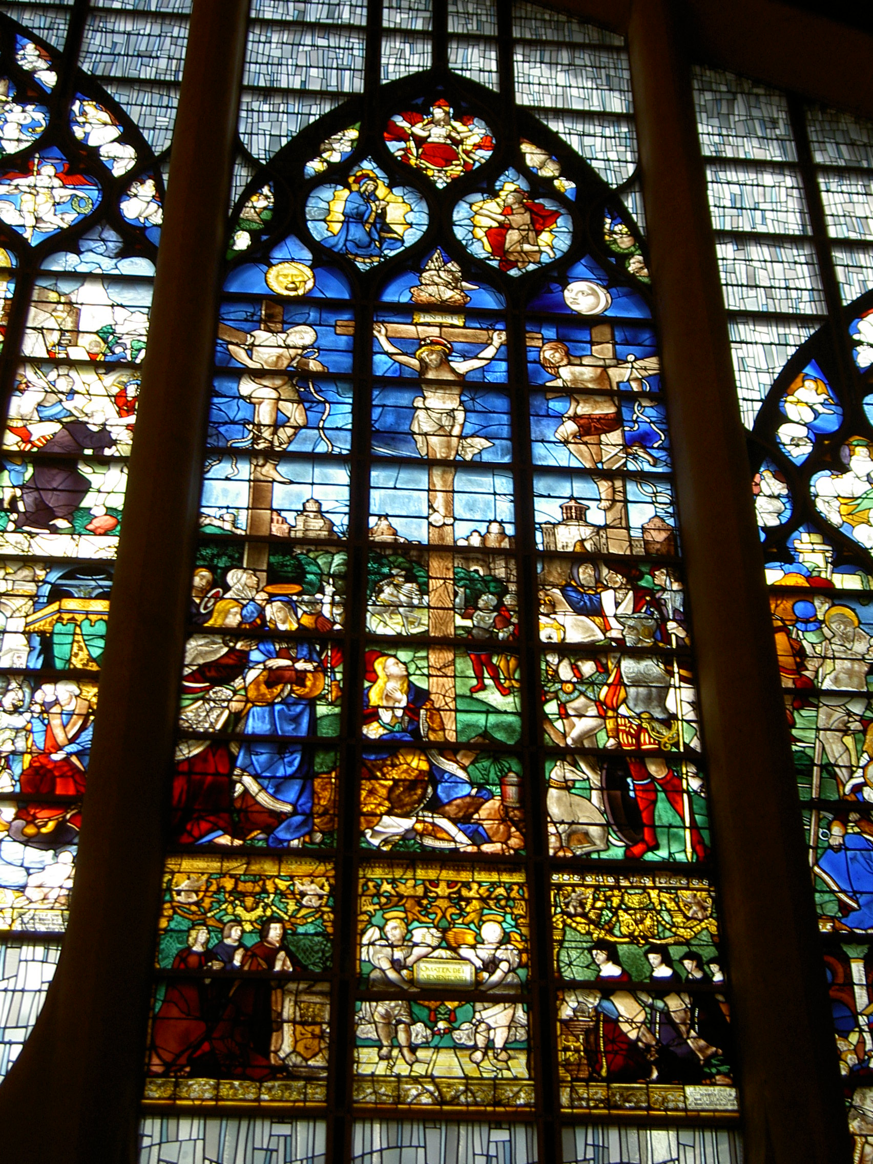 Vitraux de l'église Sainte-Jeanne d'Arc, Rouen, france Stained glass